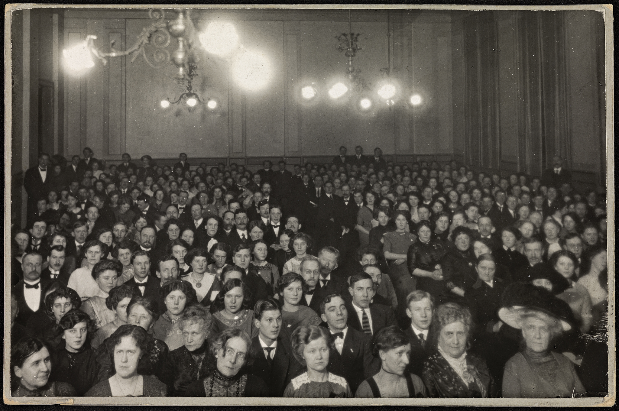 Tittel / Title: Møte i Norges Godtemplar Ungdomsforbund Beskrivelse / Description: Dato / Date: 9. februar 1913 Fotograf / Photographer: ukjent / unknown Sted / Place: Oslo, Møllergata 20 Eier / Owner Institution: Nasjonalbiblioteket / National Library of Norway Lenke / Link: Bildesignatur / Image Number: blds_05883